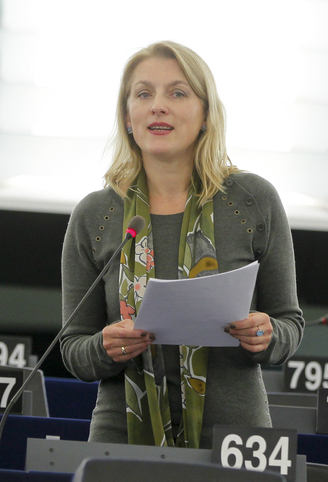 Evelyn Regner im Plenum in Straßburg